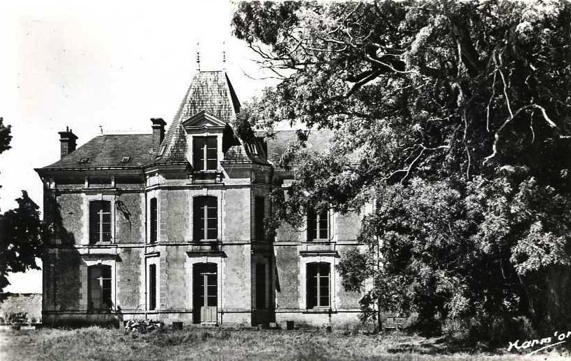 Château de Latingy, Mardié, Loiret, France